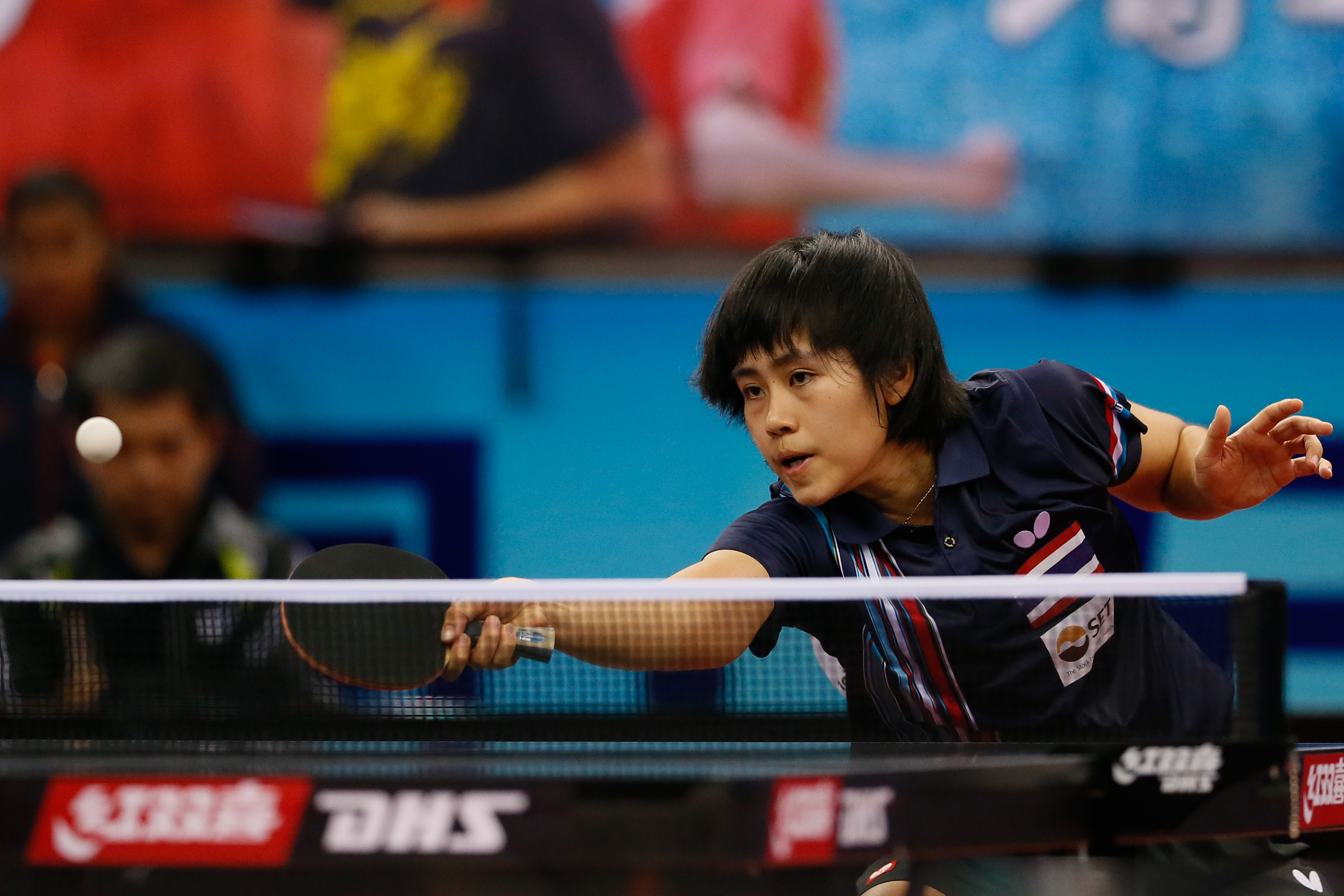 _K0K7605